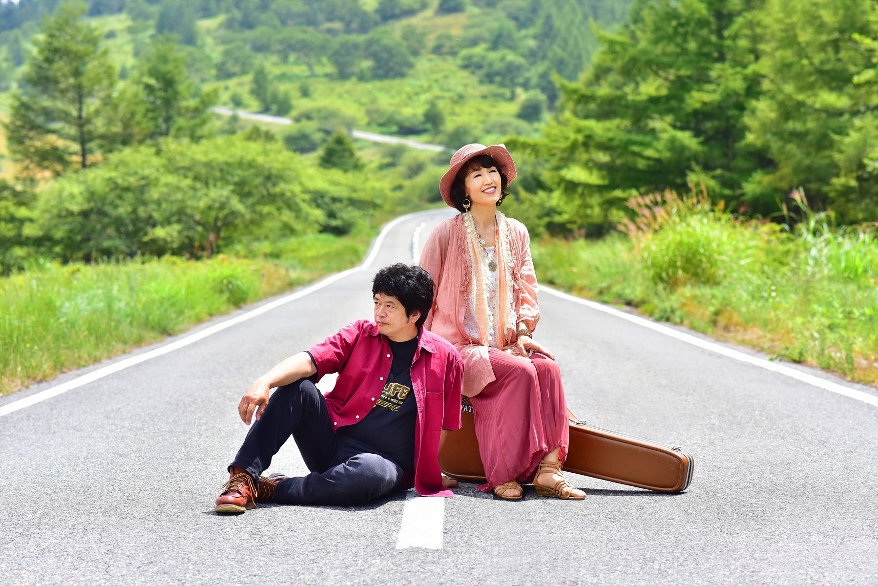 雅音人アーティスト写真 2016年8月長野県にて撮影